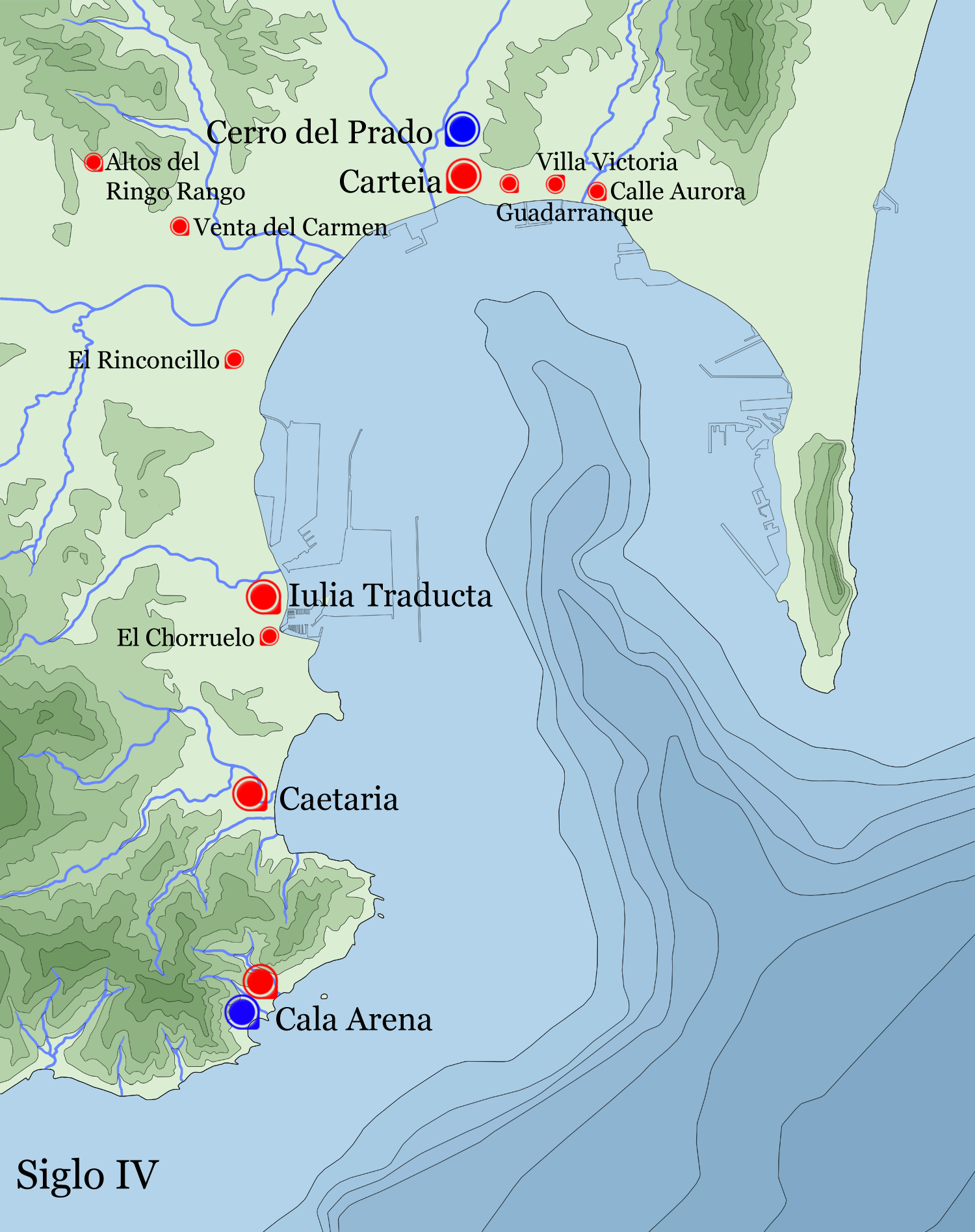 Mapa indicativo de las poblaciones del siglo IV de la bahía de Algeciras, Andalucía, España.